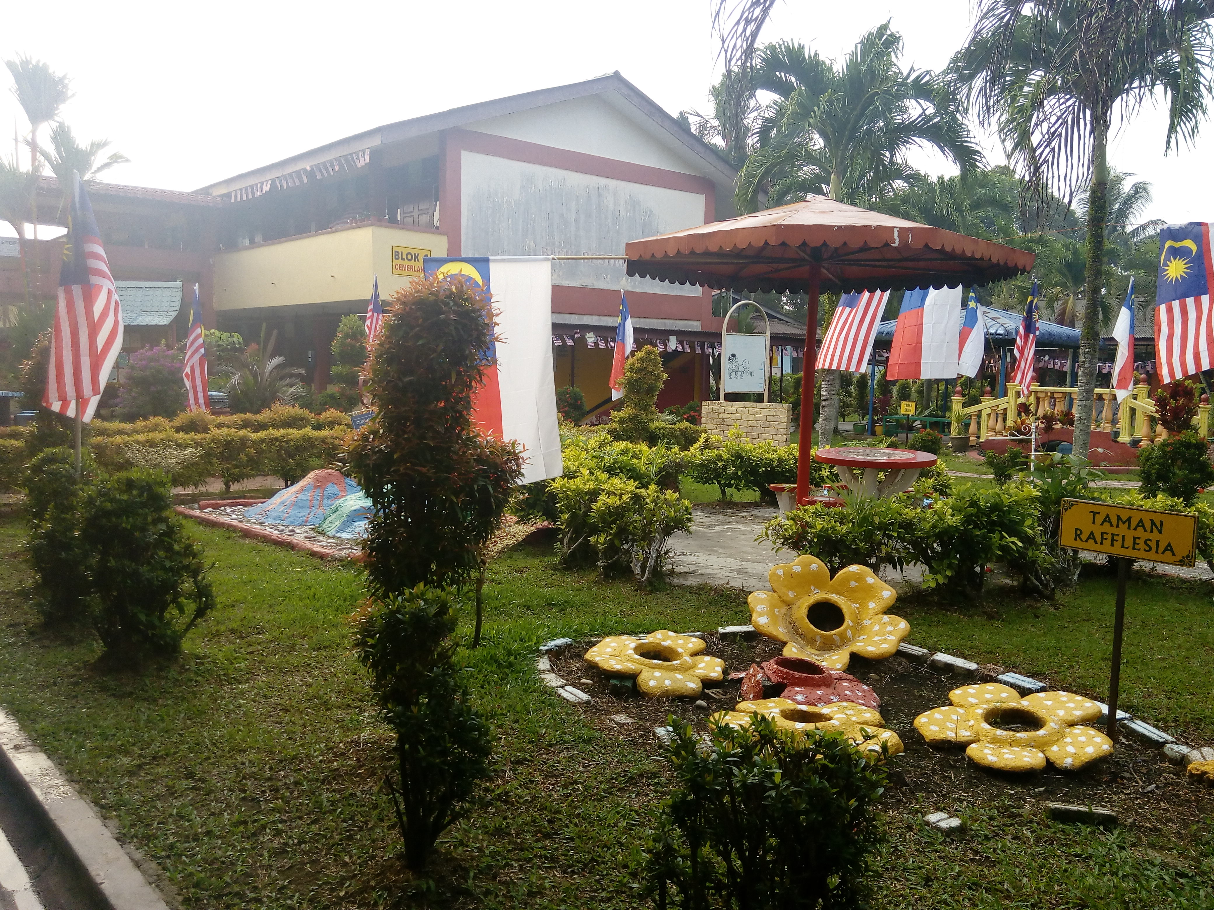 Bendera Jalur Gemilang dipasang di segenap ruang